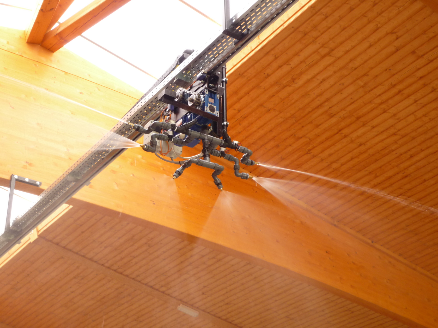 Fahrbare Reithallenberengung mit Sprükreuz